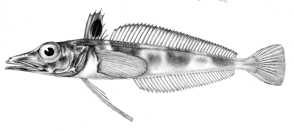 Chaenodraco wilsoni